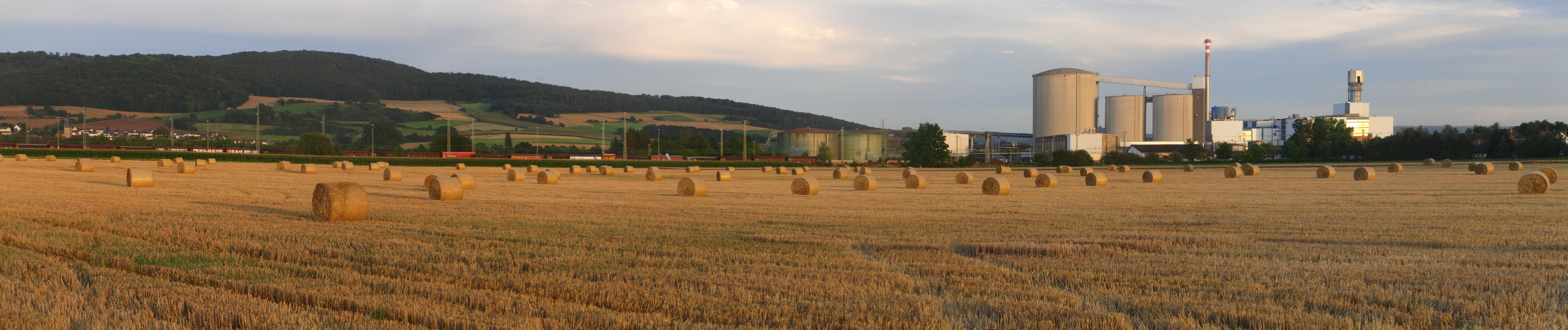 Panorama der Zuckerfabrik Wabern (Nordhessen)